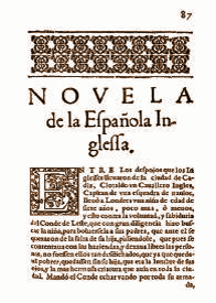 Picture of Cervantes work